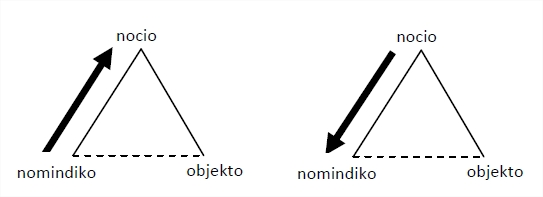 Maldekstre, semasiologio. Dekstre, onomasiologio.